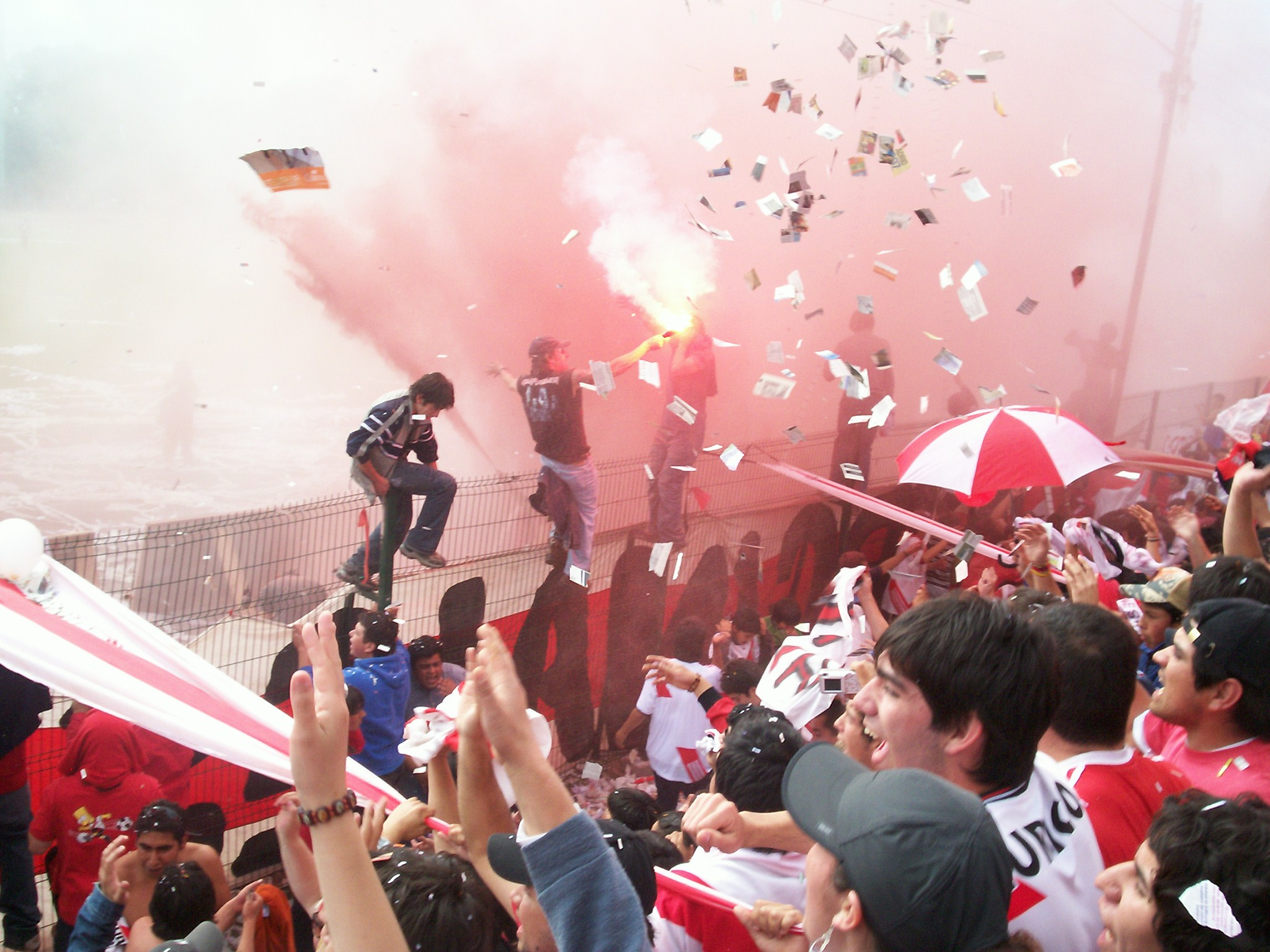 Desde dentro de la barra recibiendo a los jugadores.